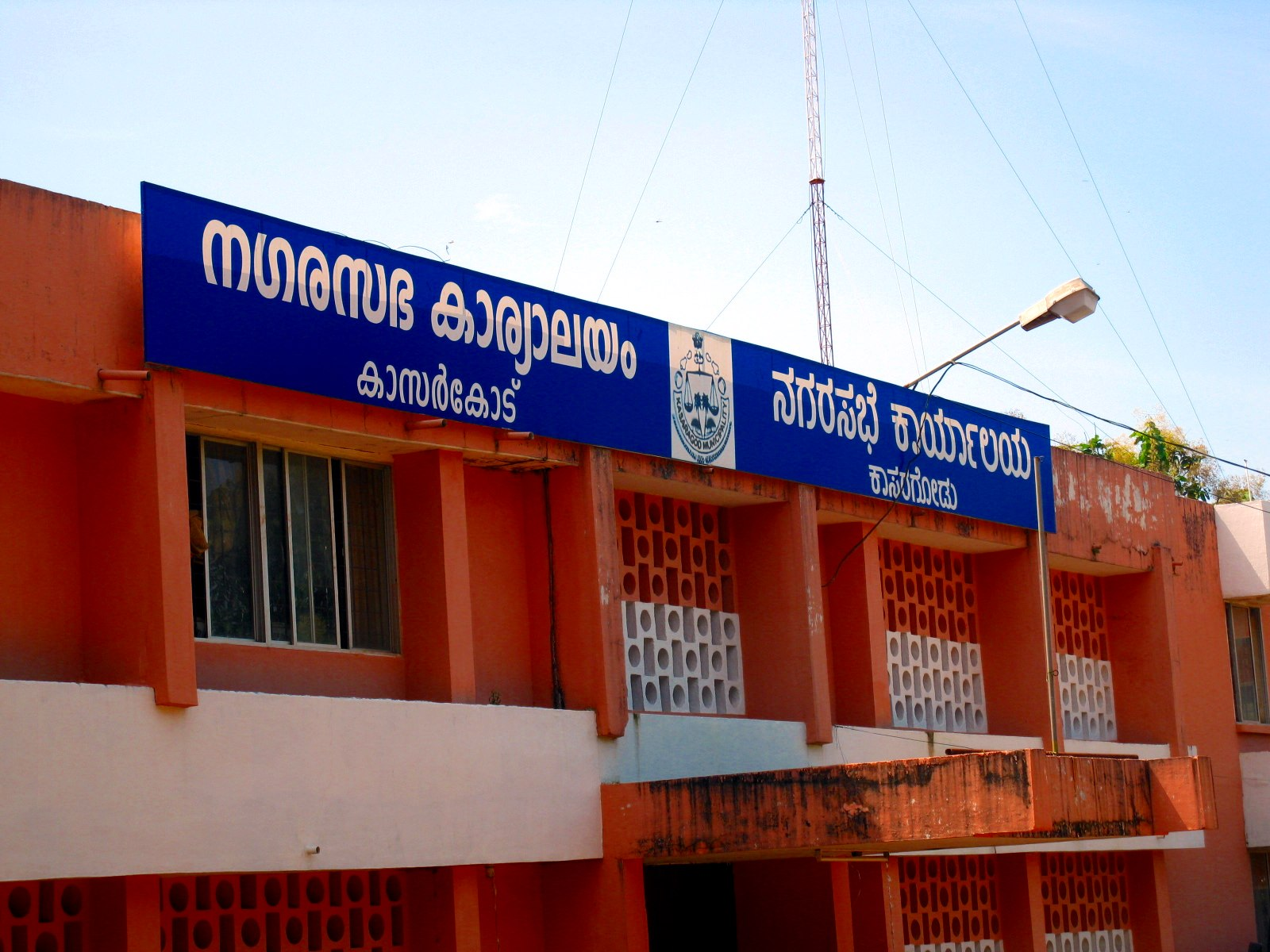 കാസർഗോഡ് ജില്ലയുടെ പുലിക്കുന്നിലുള്ള നഗരസഭാ കാര്യാലയം